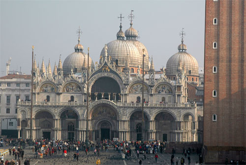 Basilica di San Marco (Venise, Italy)